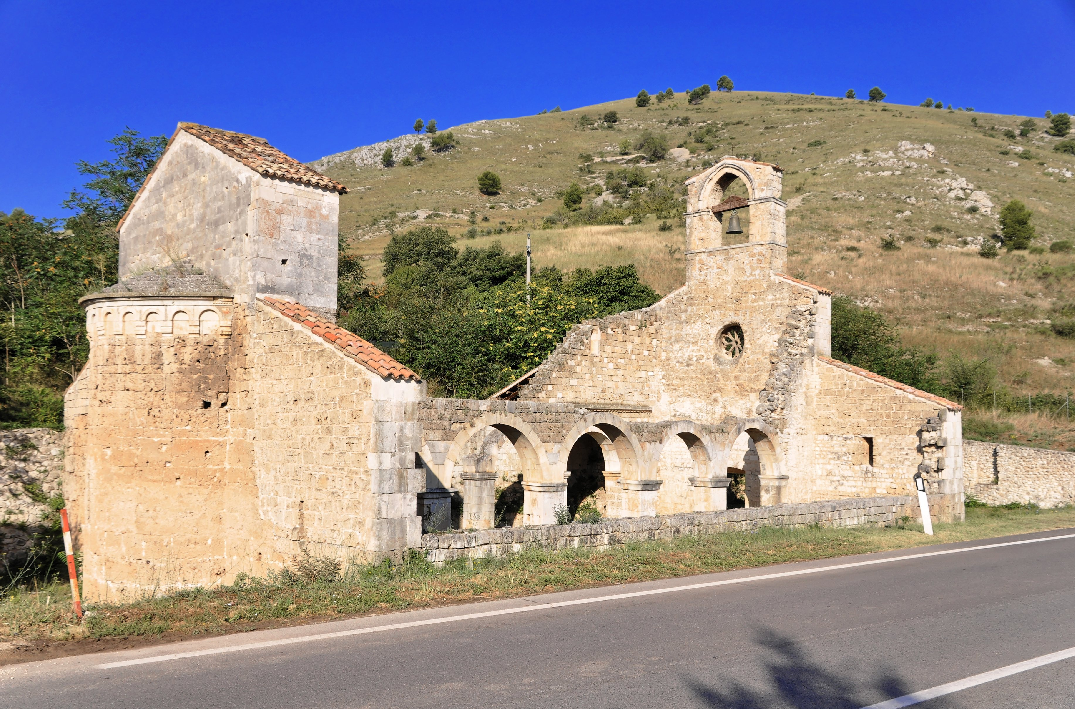 Bussi sul Tirino 2013